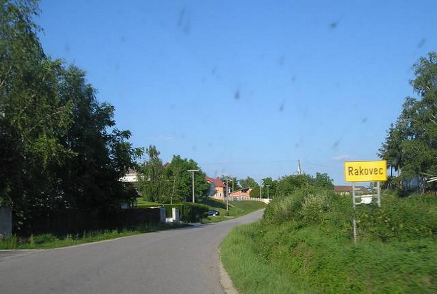 Rakovec - Entrance